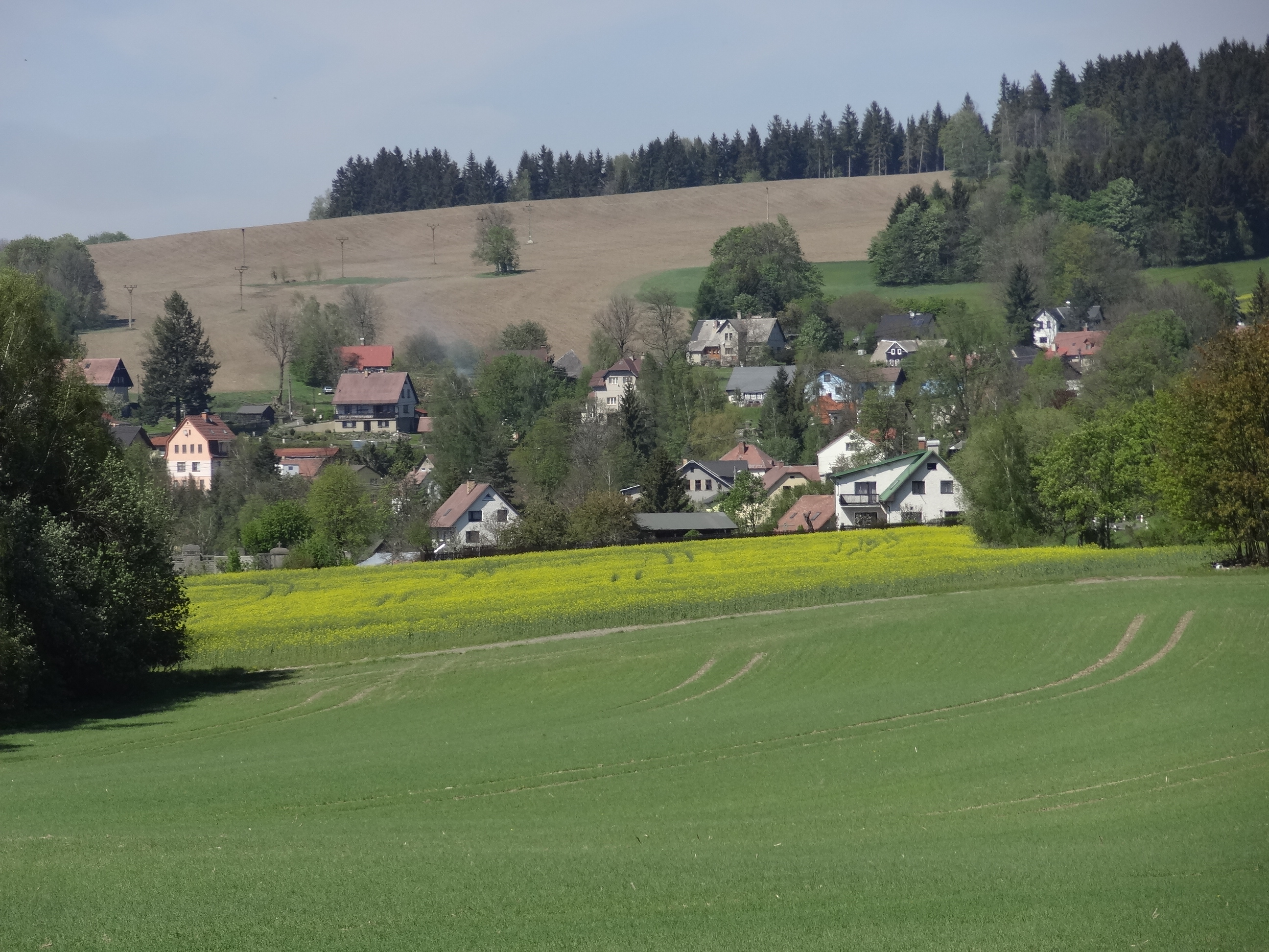 Dalešice - celkový pohled od jihu, od silnice Klíčnov-Filka